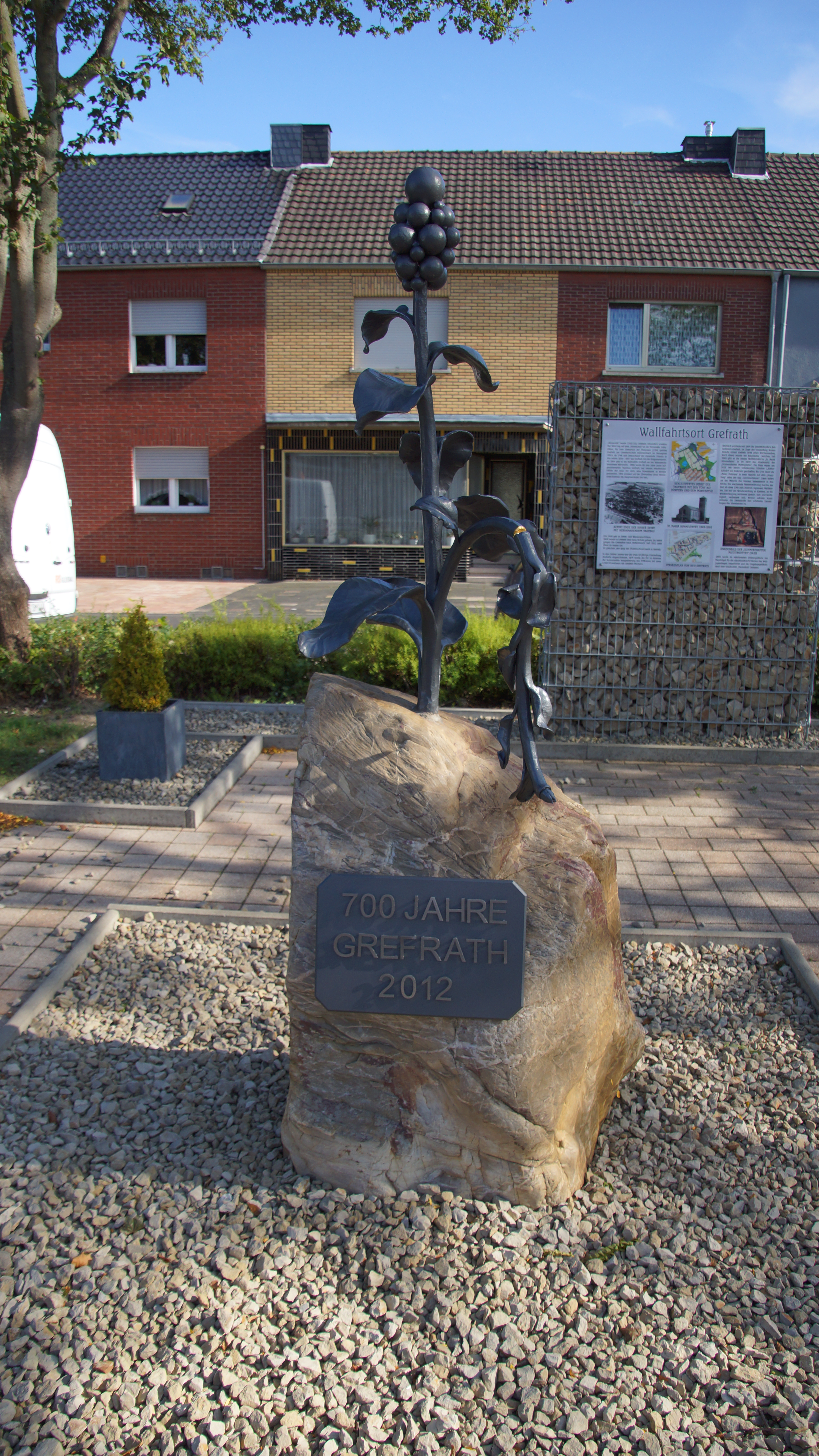 Gedenkstein 700 Jahre Grefrath